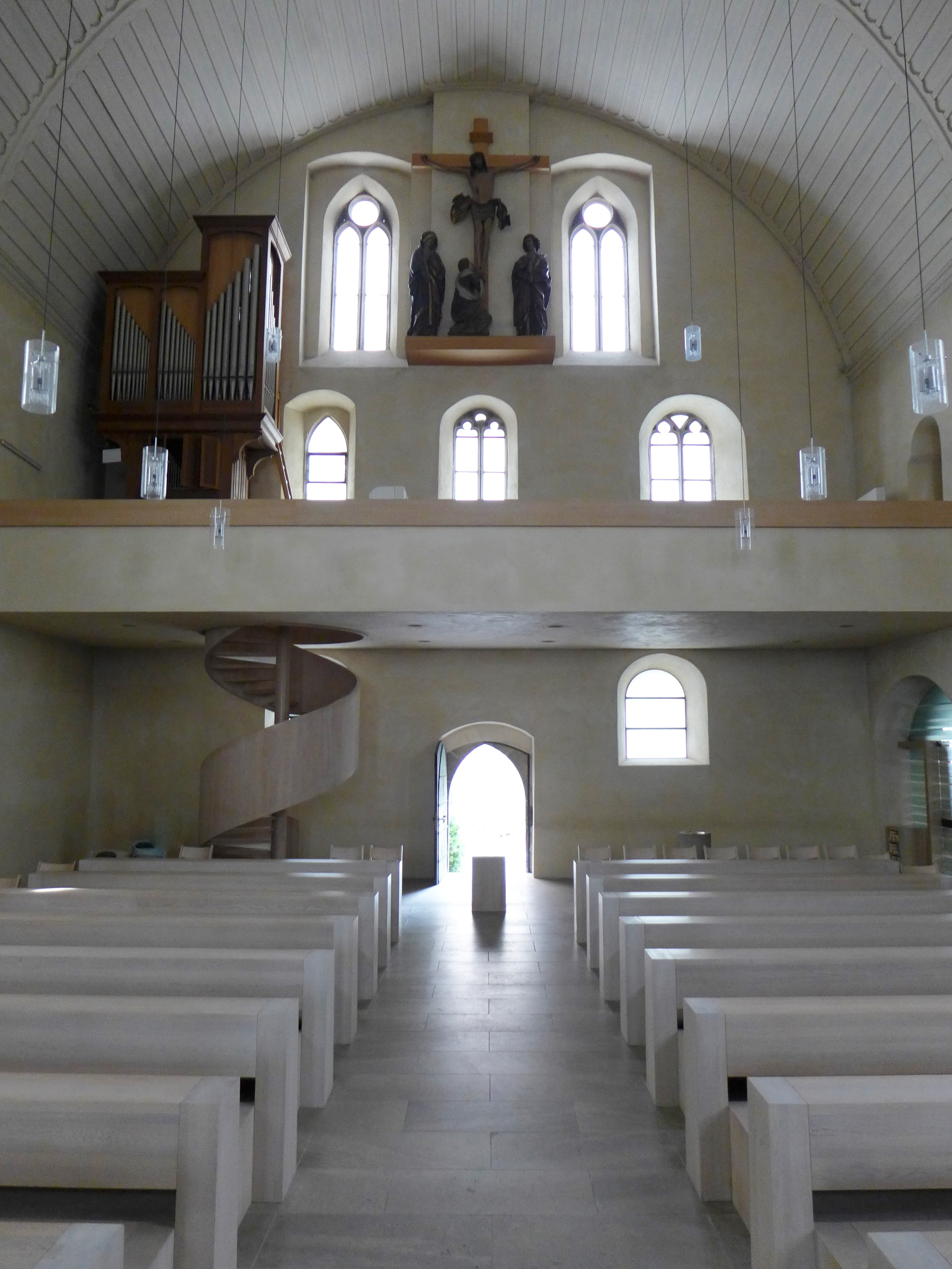 St. Klarakirche in Nürnberg, Blick von der Apsis zur Orgelempore